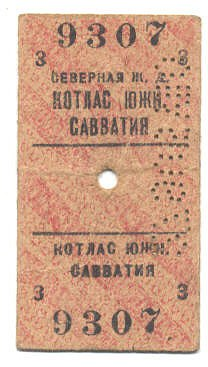 Железнодорожный билет Котлас-Южный - Савватия